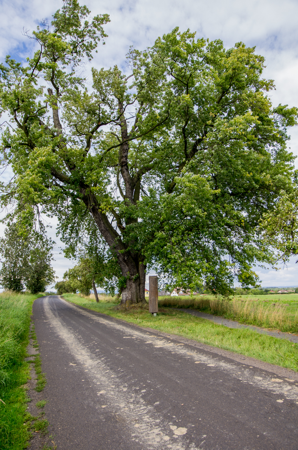 památný strom Stříbrný javor u Komorní hůrky, okres Cheb